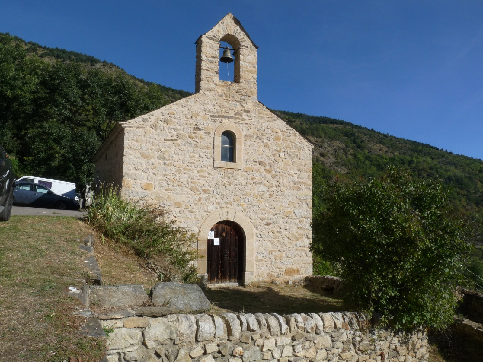 Eglise du village de Llar, Pyrénées-Orientales, France